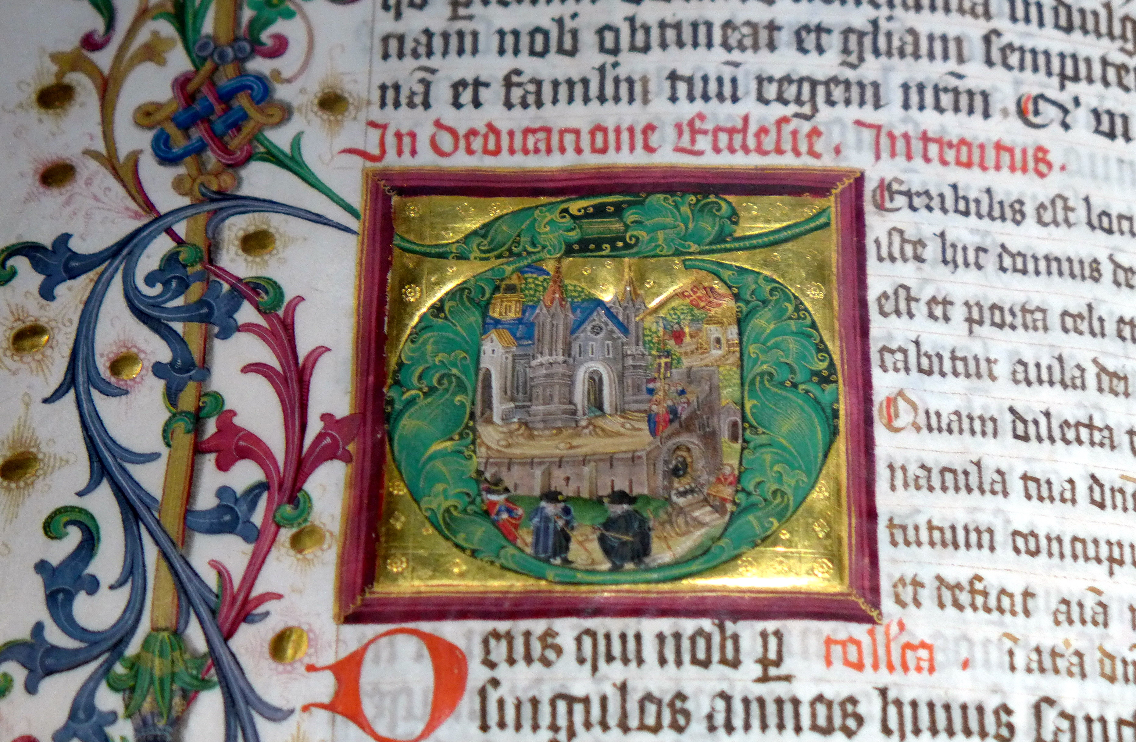 Stift Rein - Bibliothek, Wolfgang-Missale, Initiale